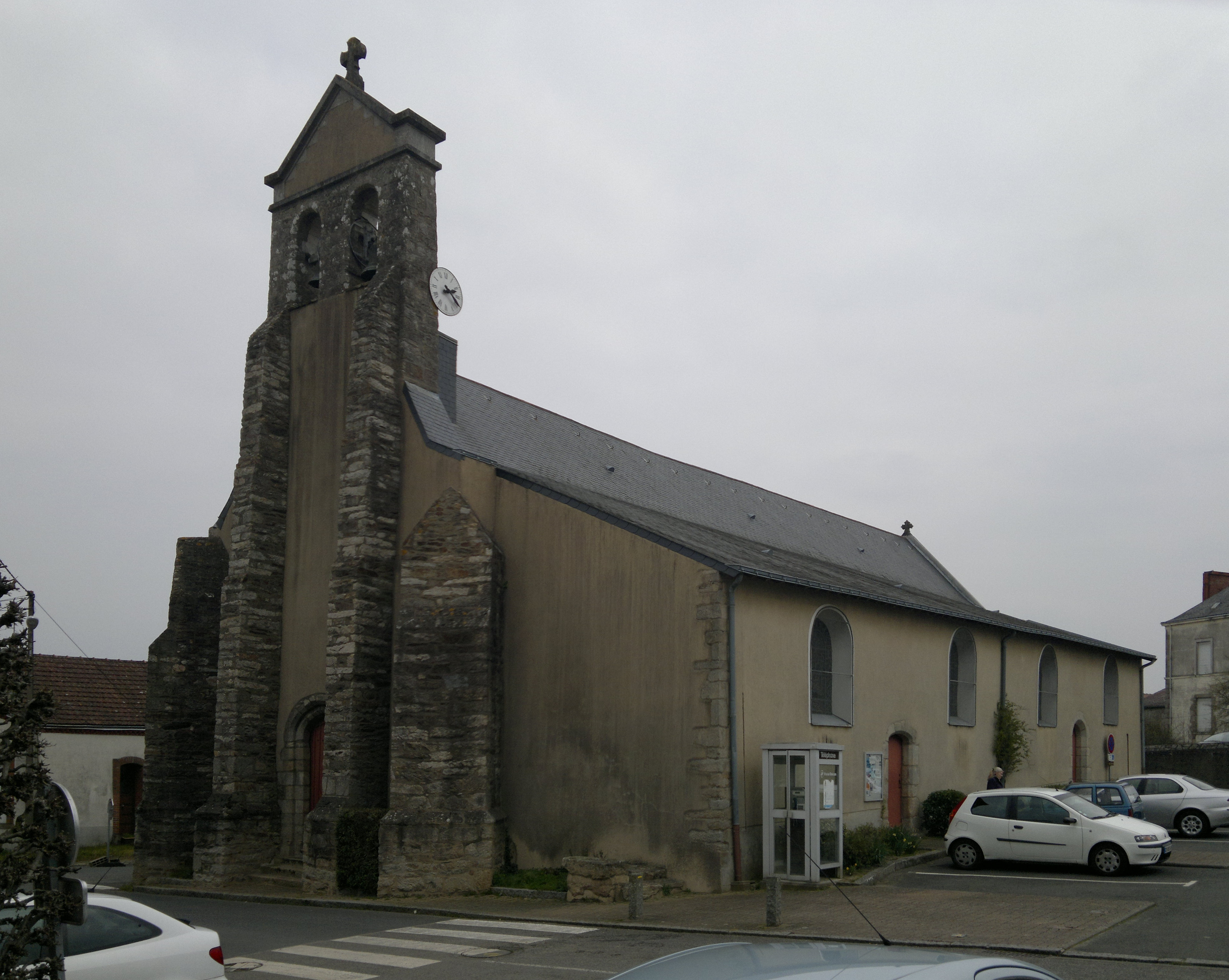 Église, Fr-44-Monnières.